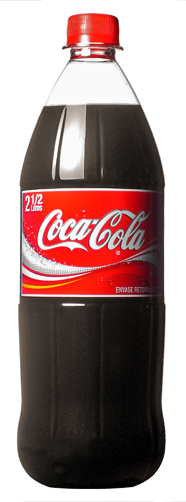 Botella de Coca-Cola de 2 1/2 litros. Comercializada en Chile.